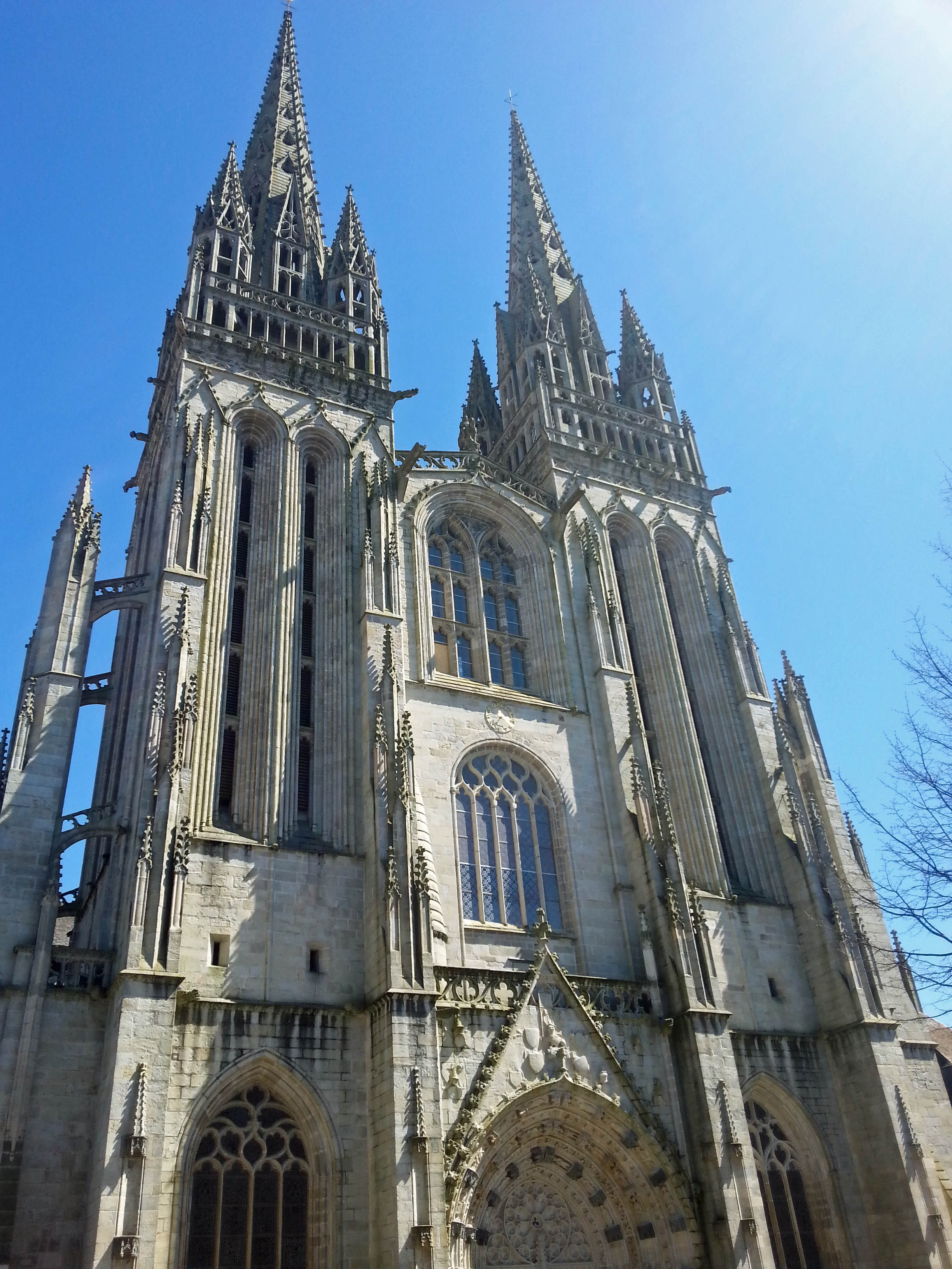 Cathédrale Saint-Corentin (Classé) .